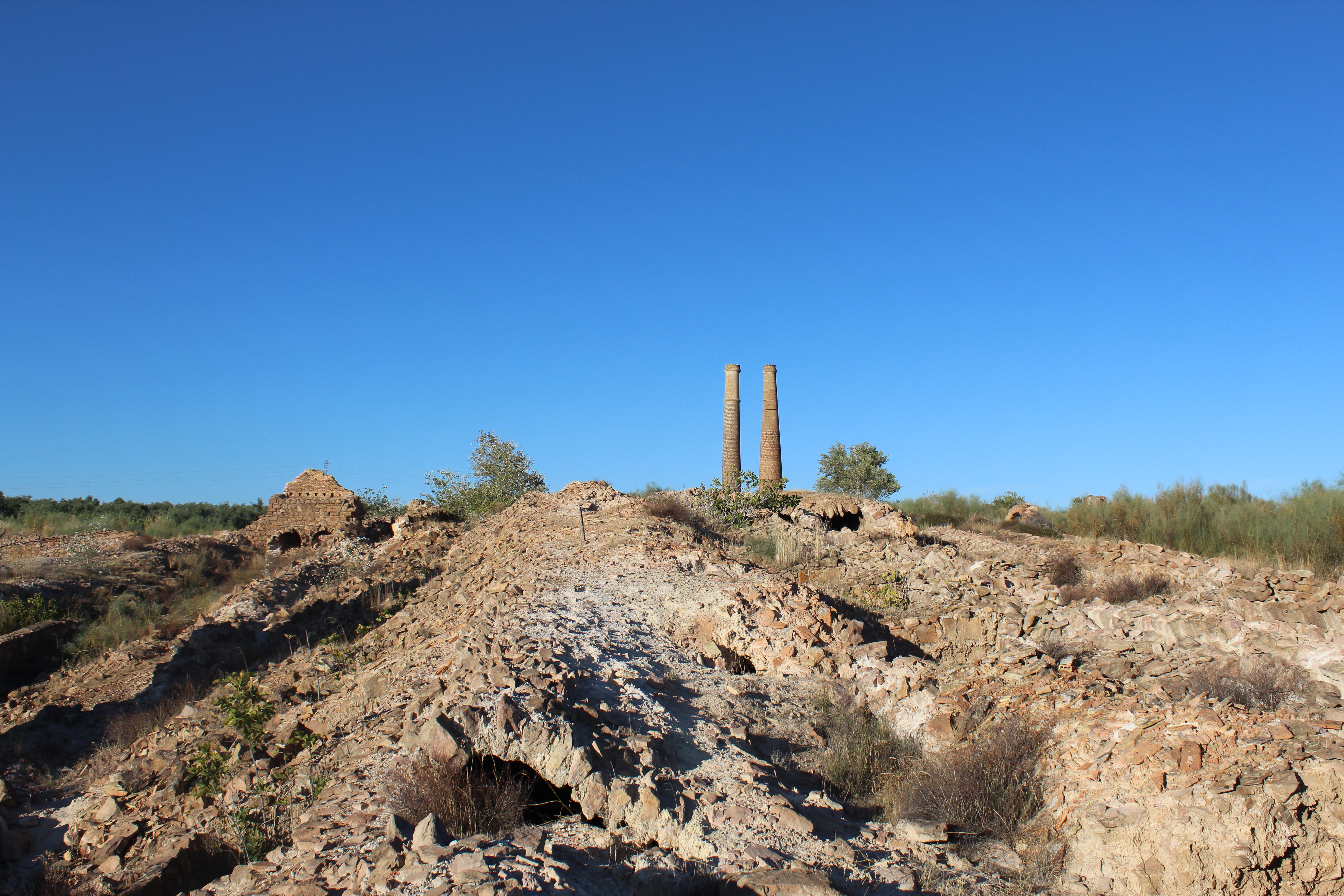 Galerías de condensación y chimeneas al fondo. Mina-Fundición La Tortilla.